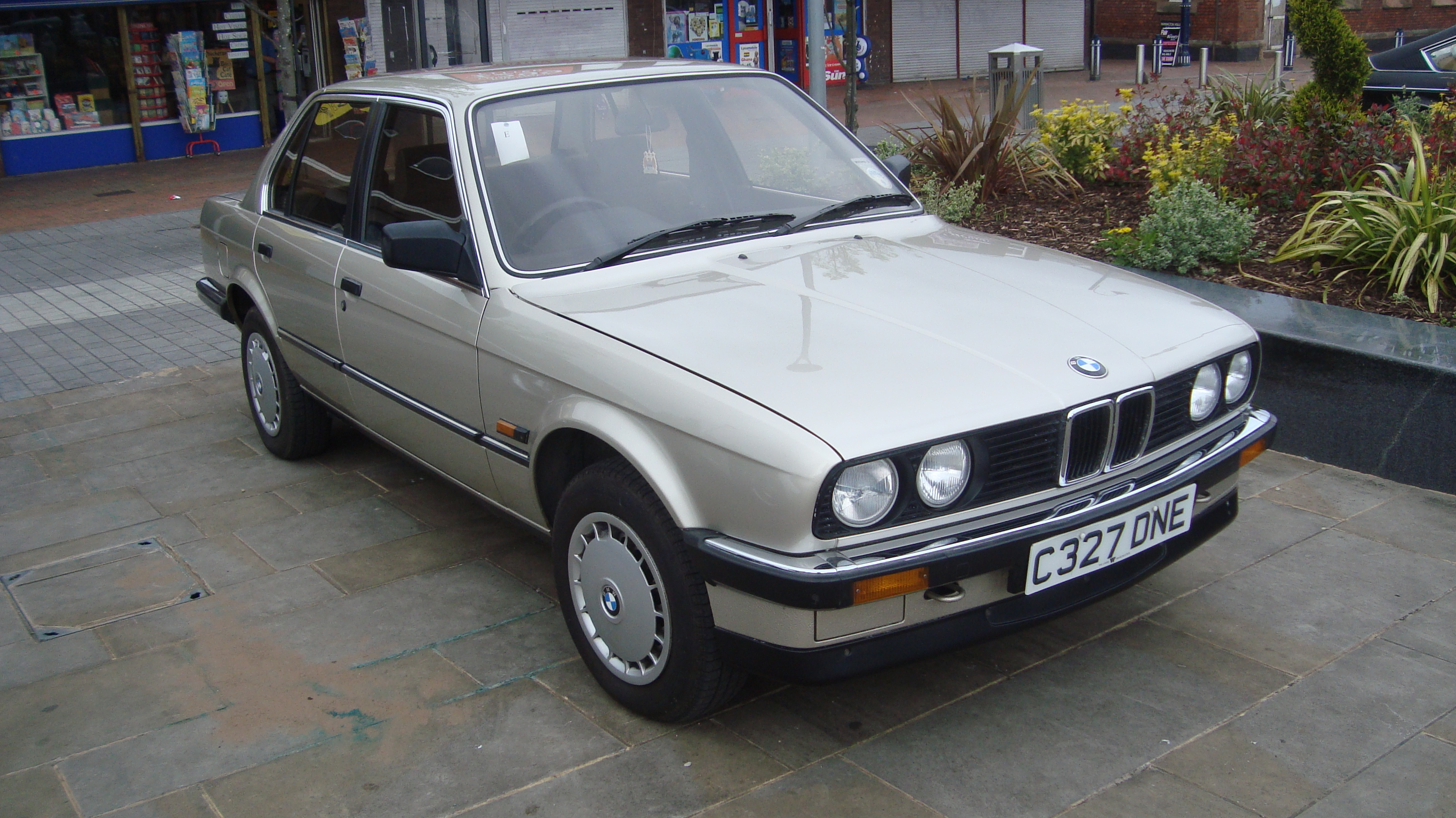 1986 BMW 316 Automatic